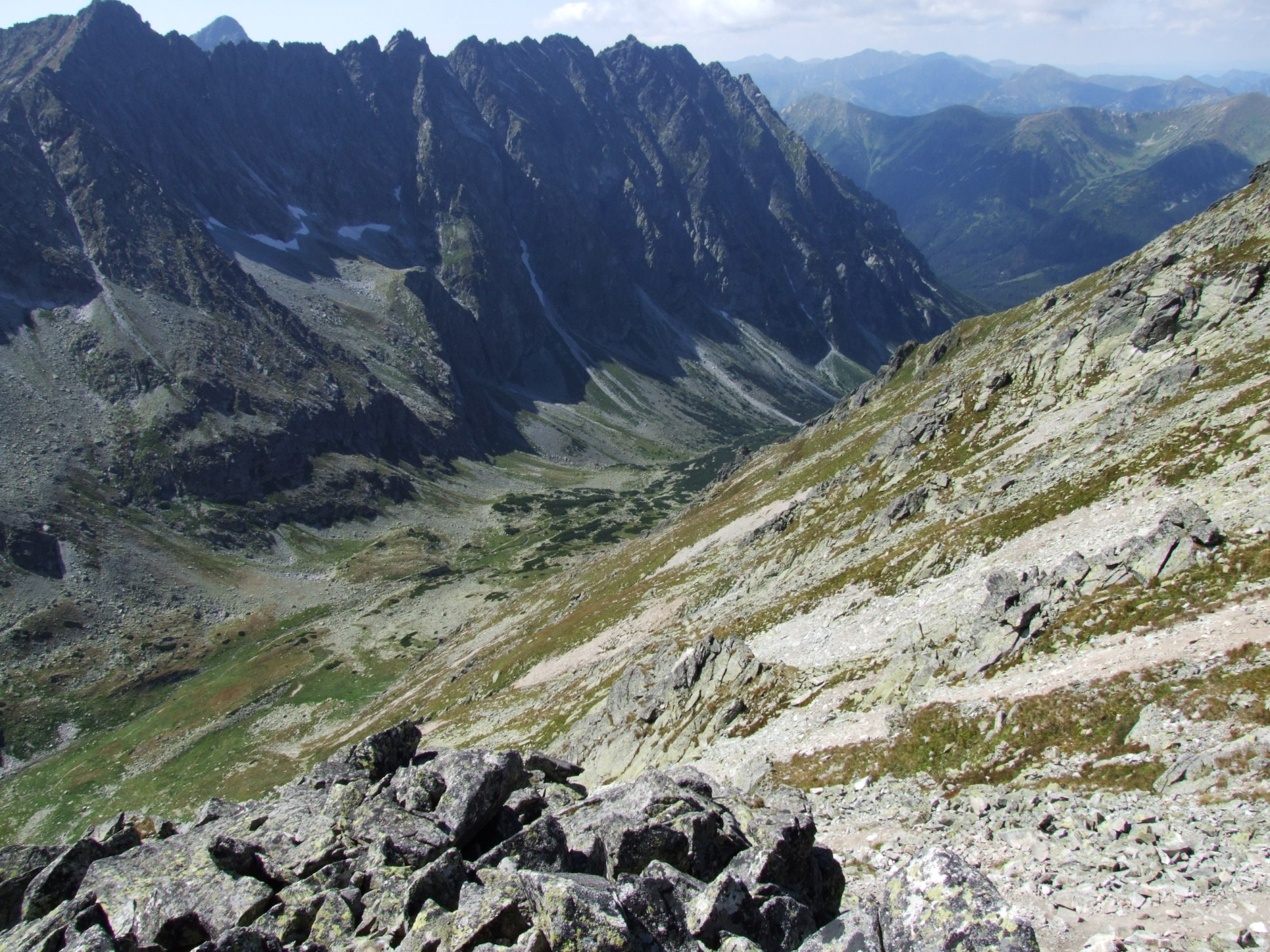 Dolina Hlińska. Widok z Wyżniej Koprowej Przełęczy